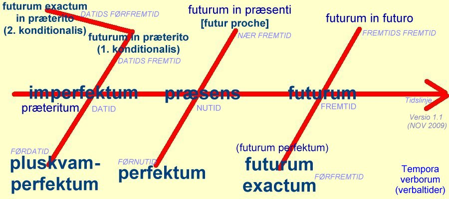 TEMPUS, grammatiske tider, mest latinske betegnelser